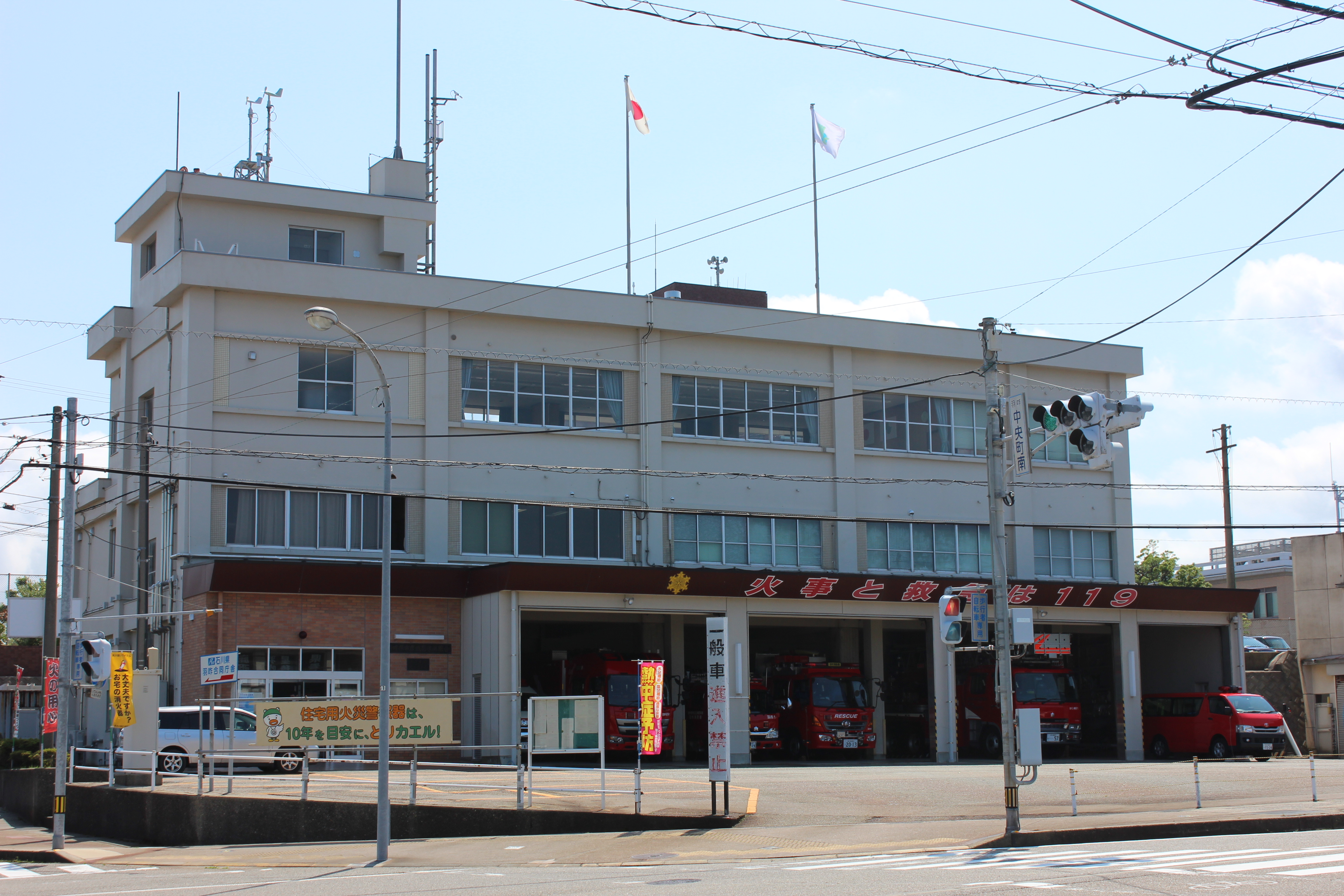 羽咋郡市広域圏事務組合消防本部・羽咋消防署（石川県羽咋市） Canon EOS Kiss X5